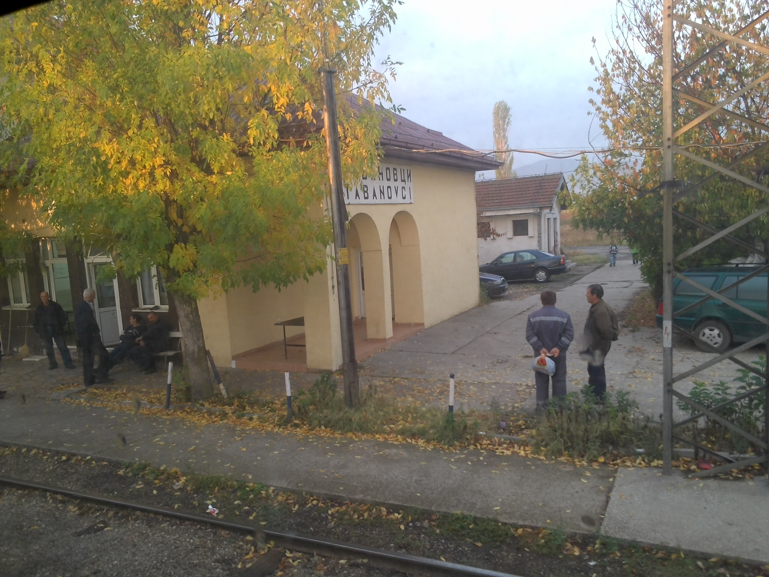 ст. Табановце